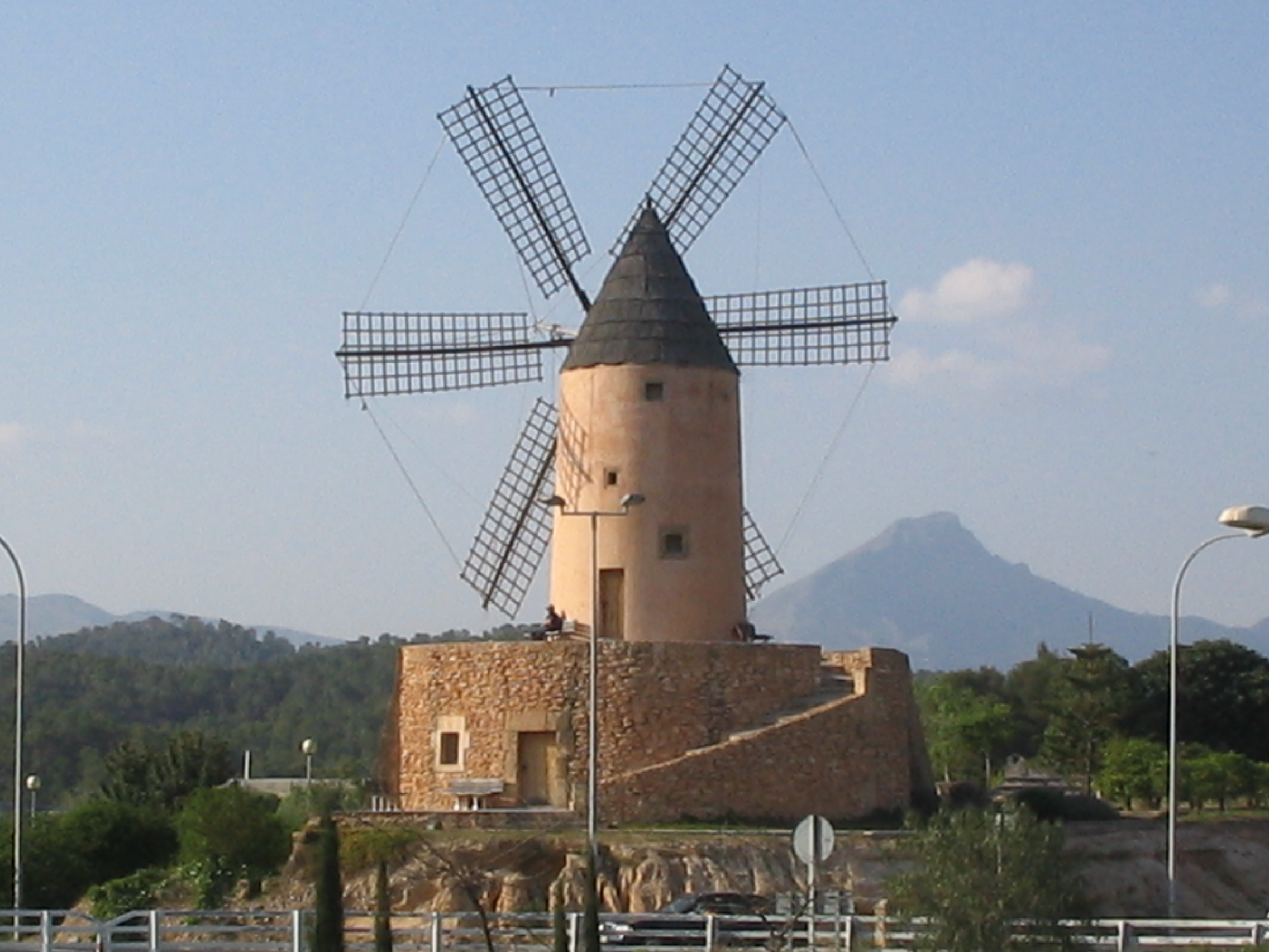 Windmill in Santa Ponça, Mallorca, Spain.